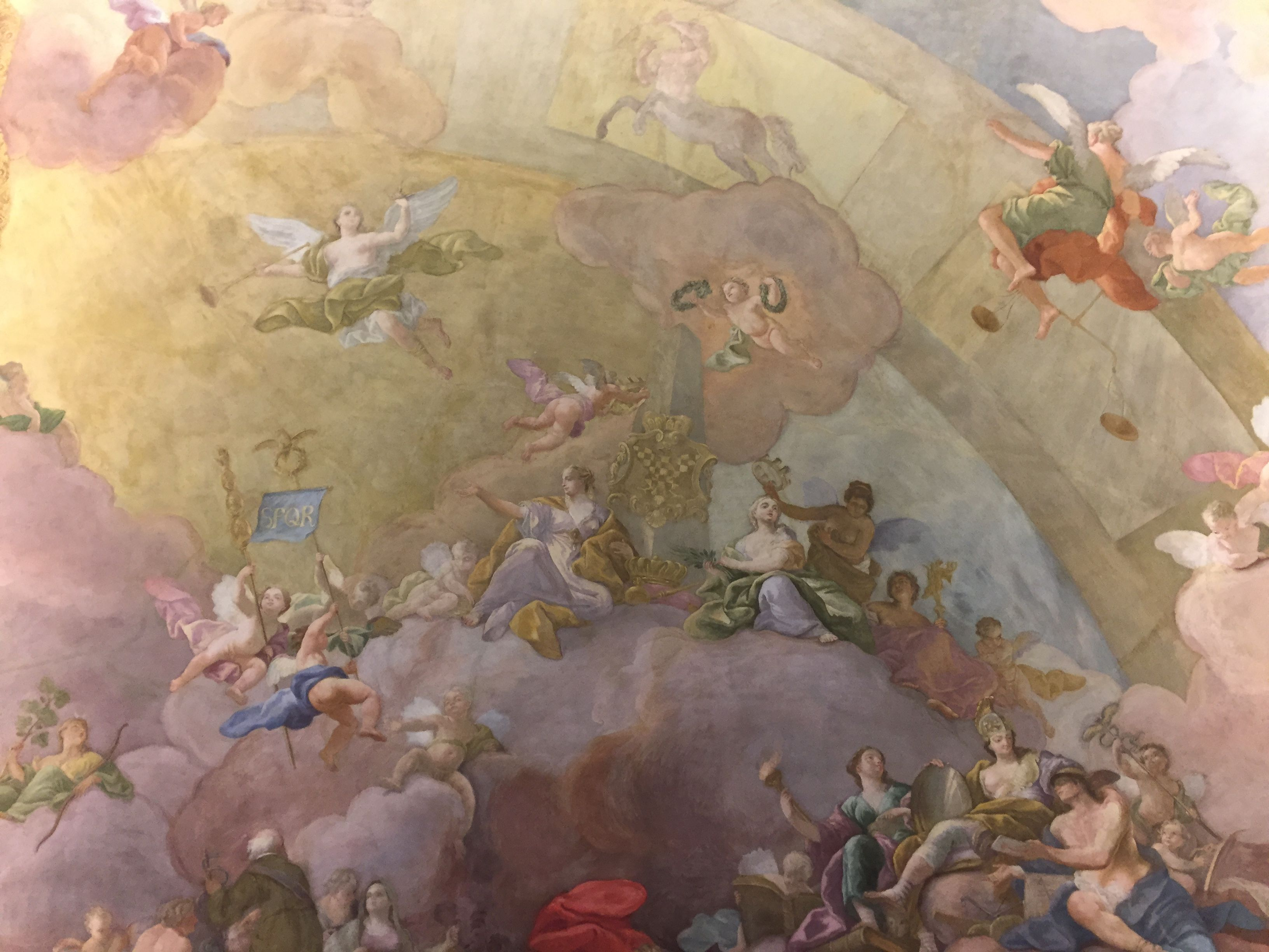 Dnes zastupitelský sál zastupitelstva města Brna na Nové radnici v Brně